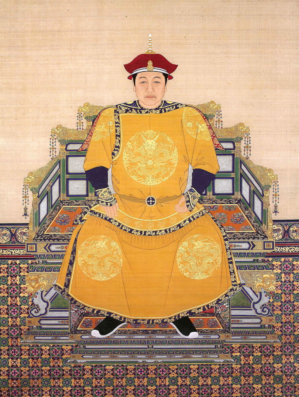 清世祖朝冠服像轴